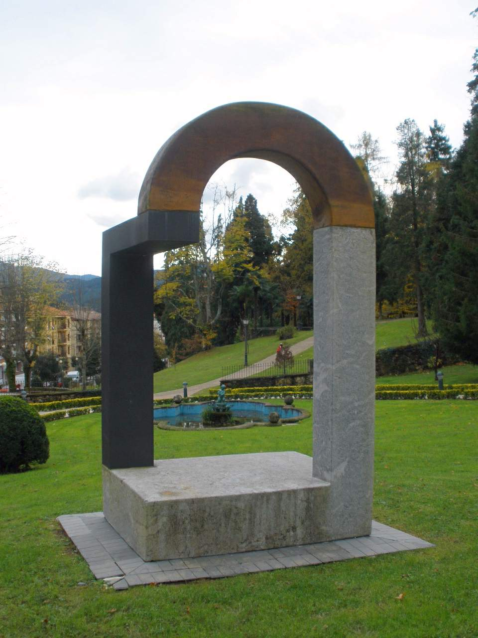 Berriz (Bizkaia)